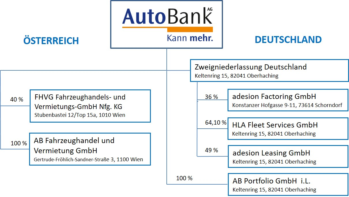 Geschäftsstruktur der AutoBank AG 2018